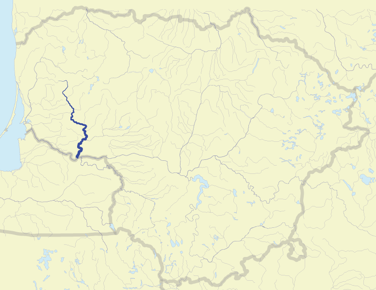 RiverJūra